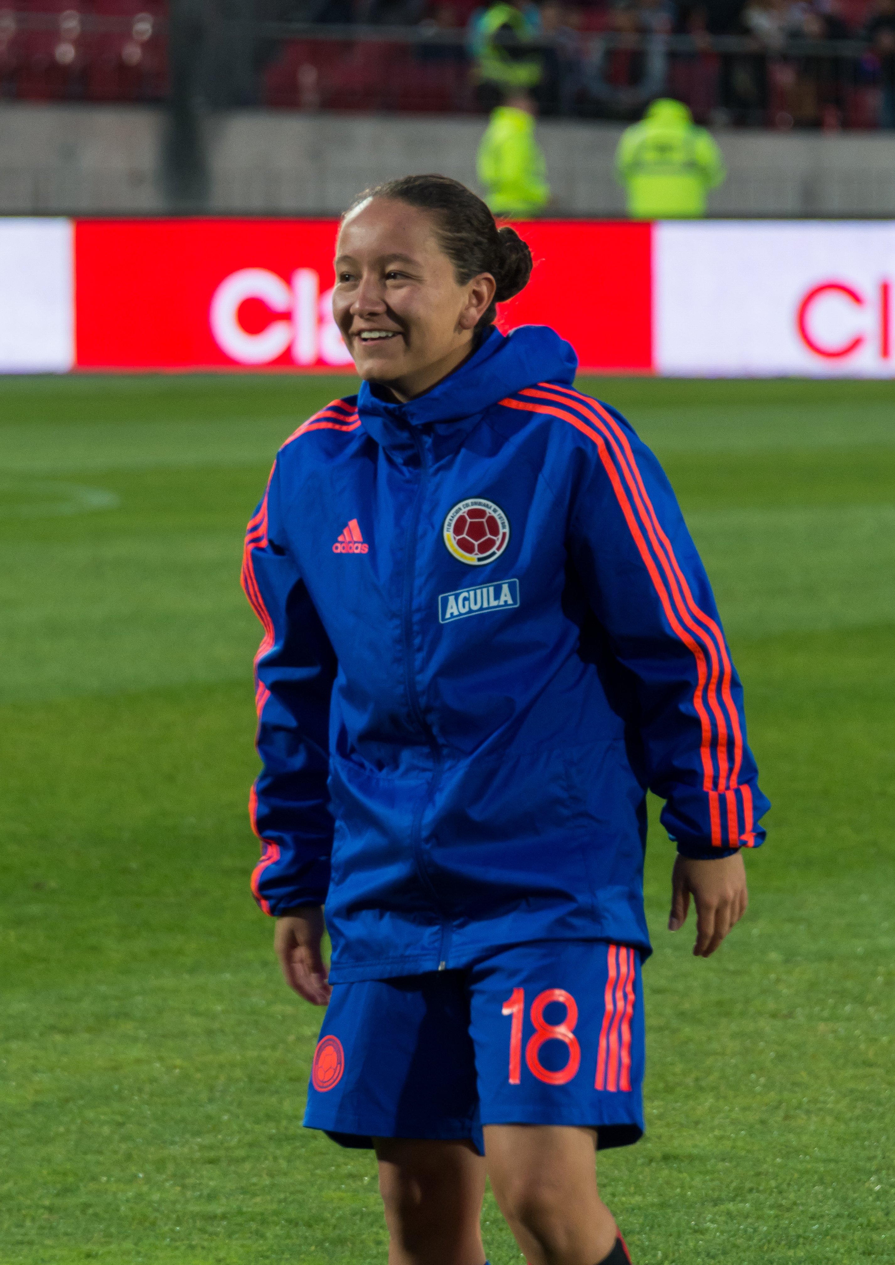 Angie Castañeda, Chile v Colombia, Estadio Nacional, Ñuñoa, Santiago, Chile.